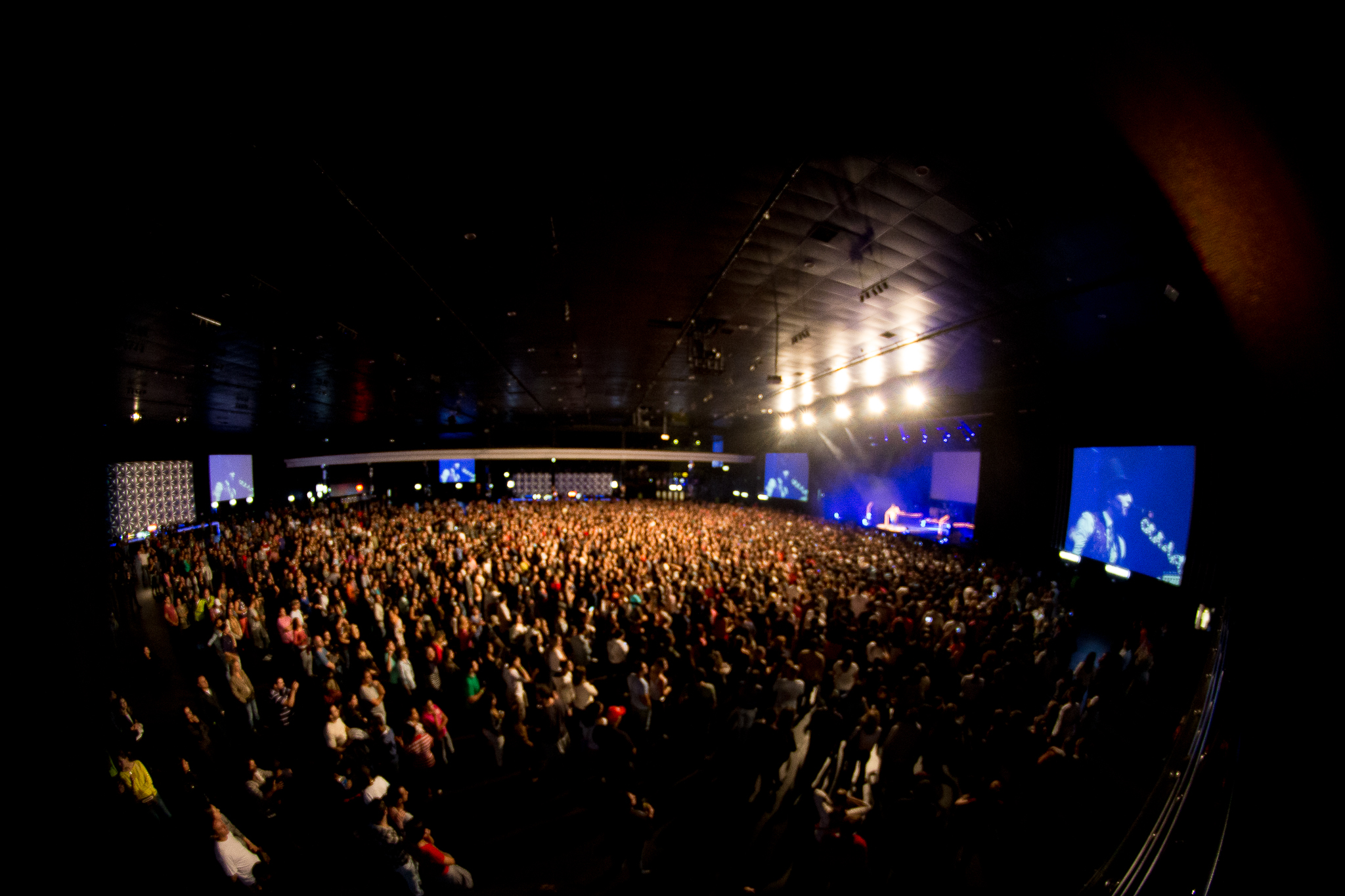 Foto: Luiz Rodrigues